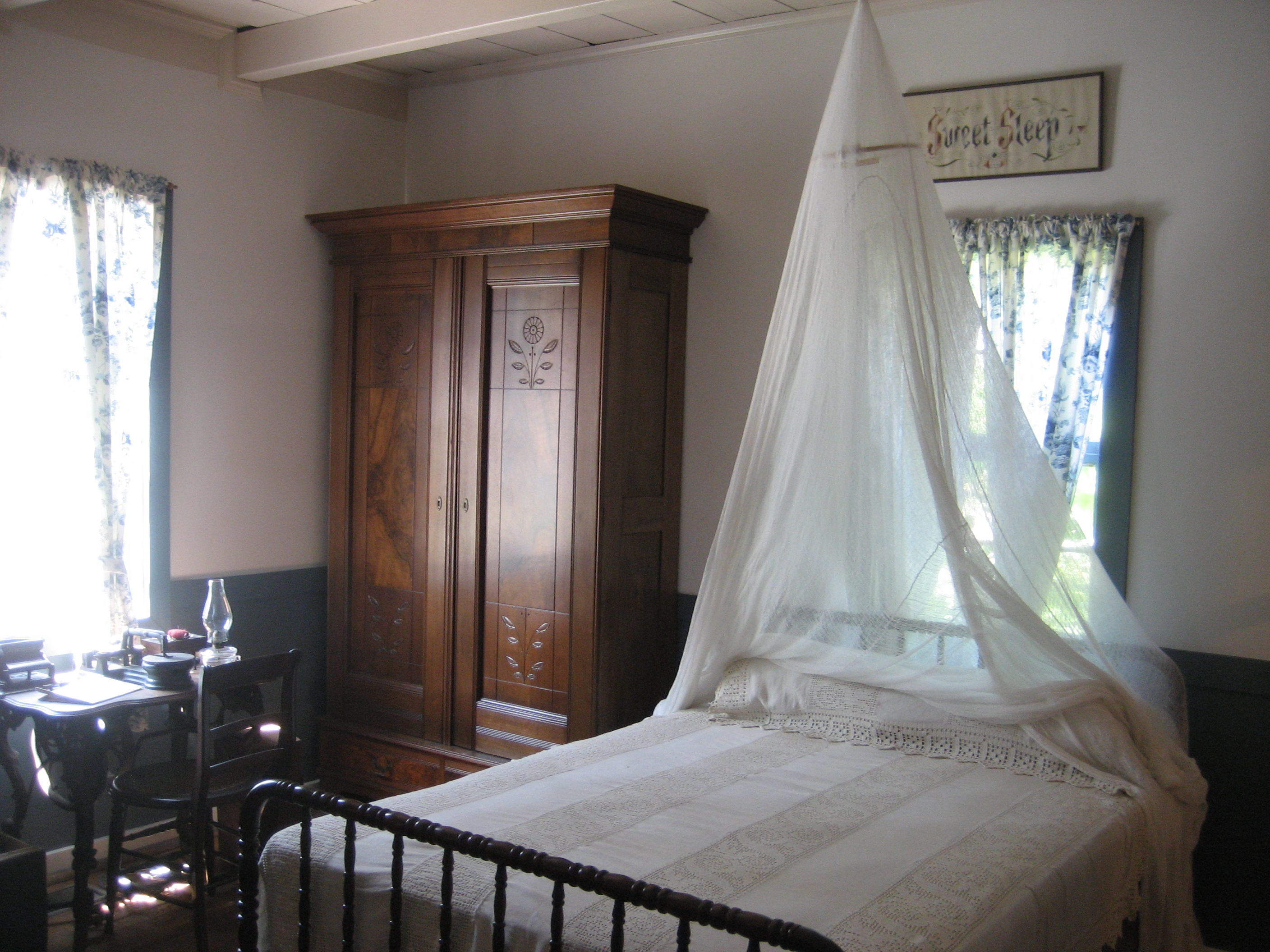 Pensacola, Florida. Historic district museum complex.